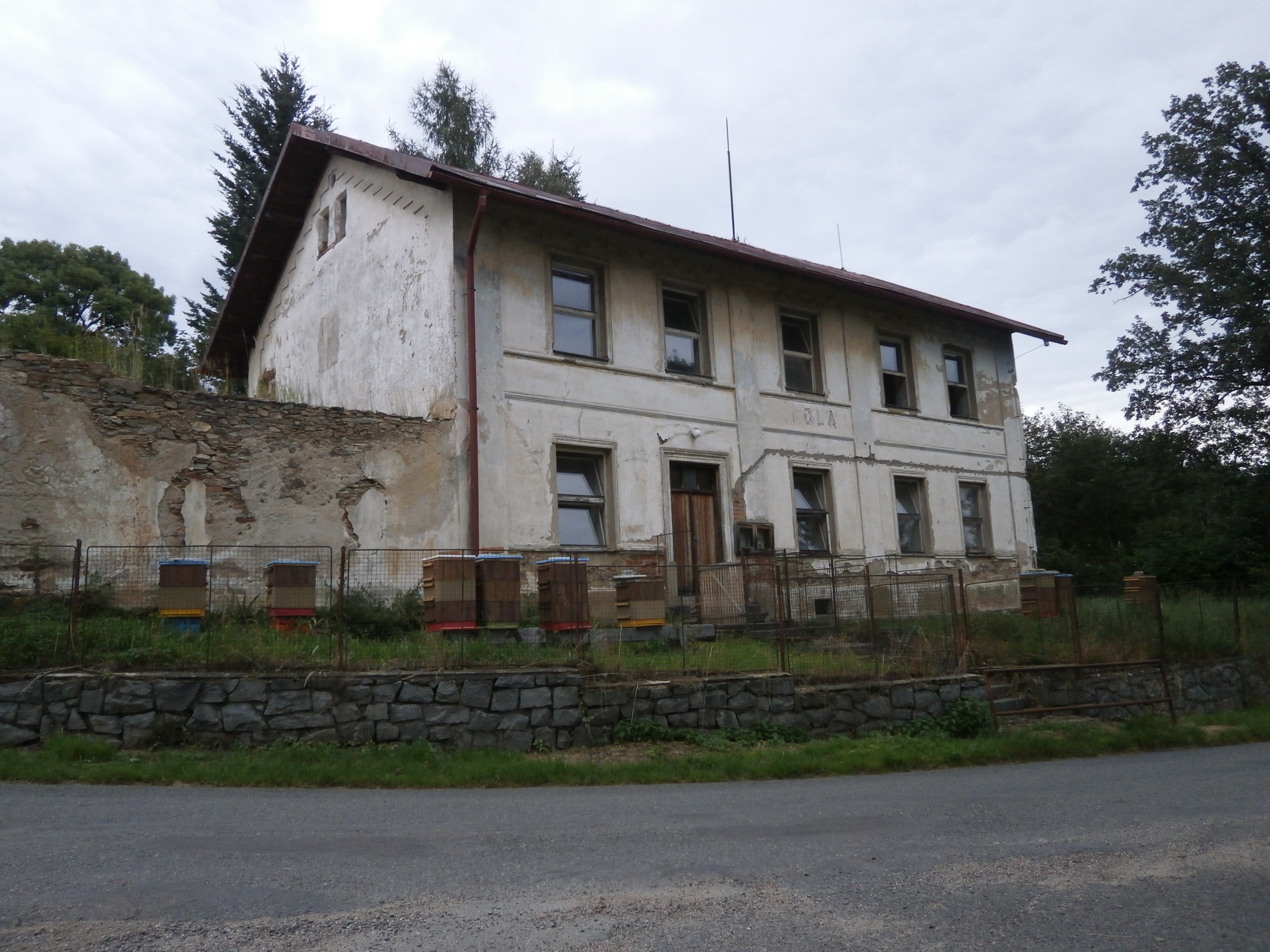 Rychnov - č.p. 79